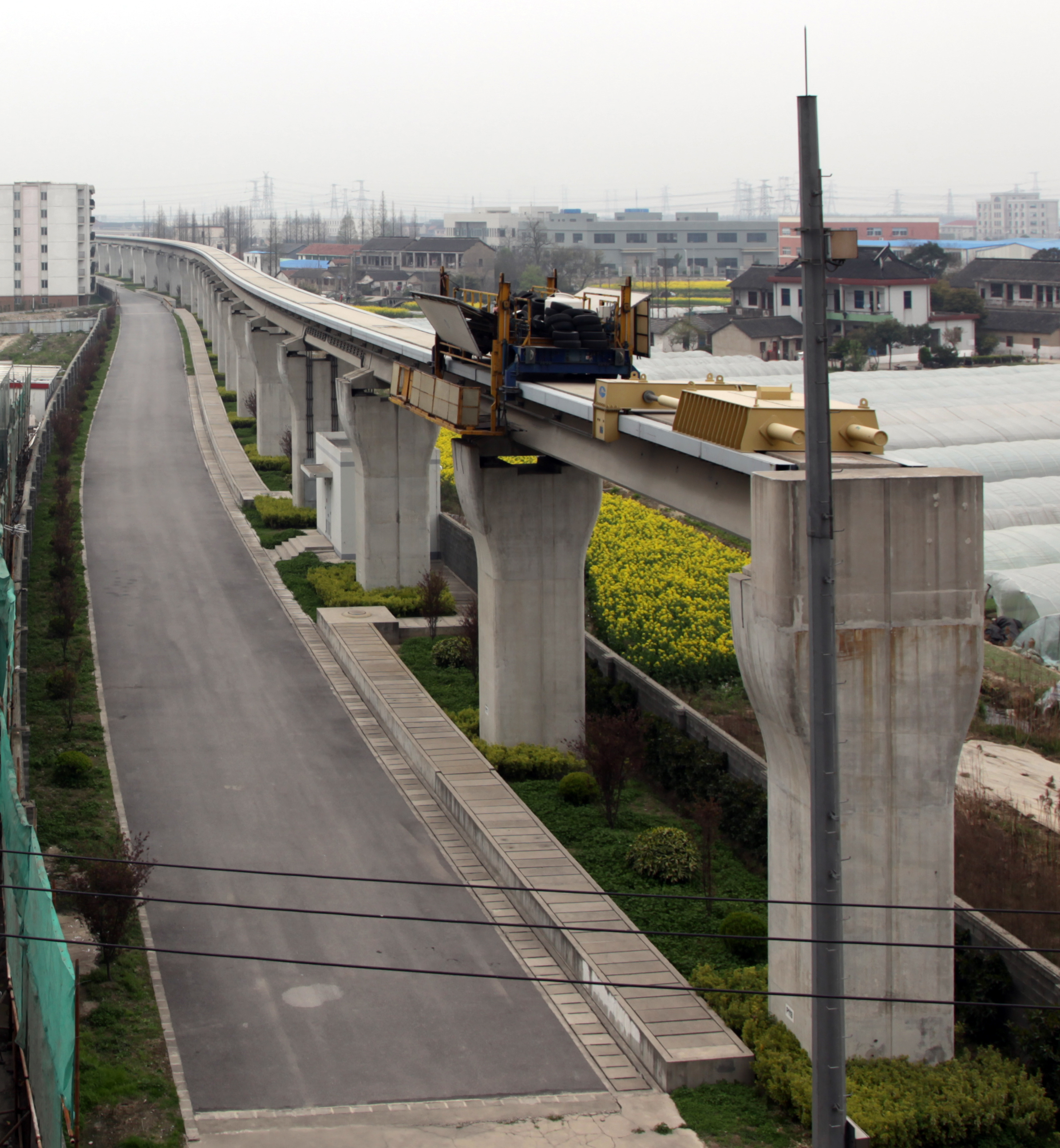 Puffer am Ende der Teststrecke auf dem Gelände der Tongji-Universität, Jiading Campus, Shanghai